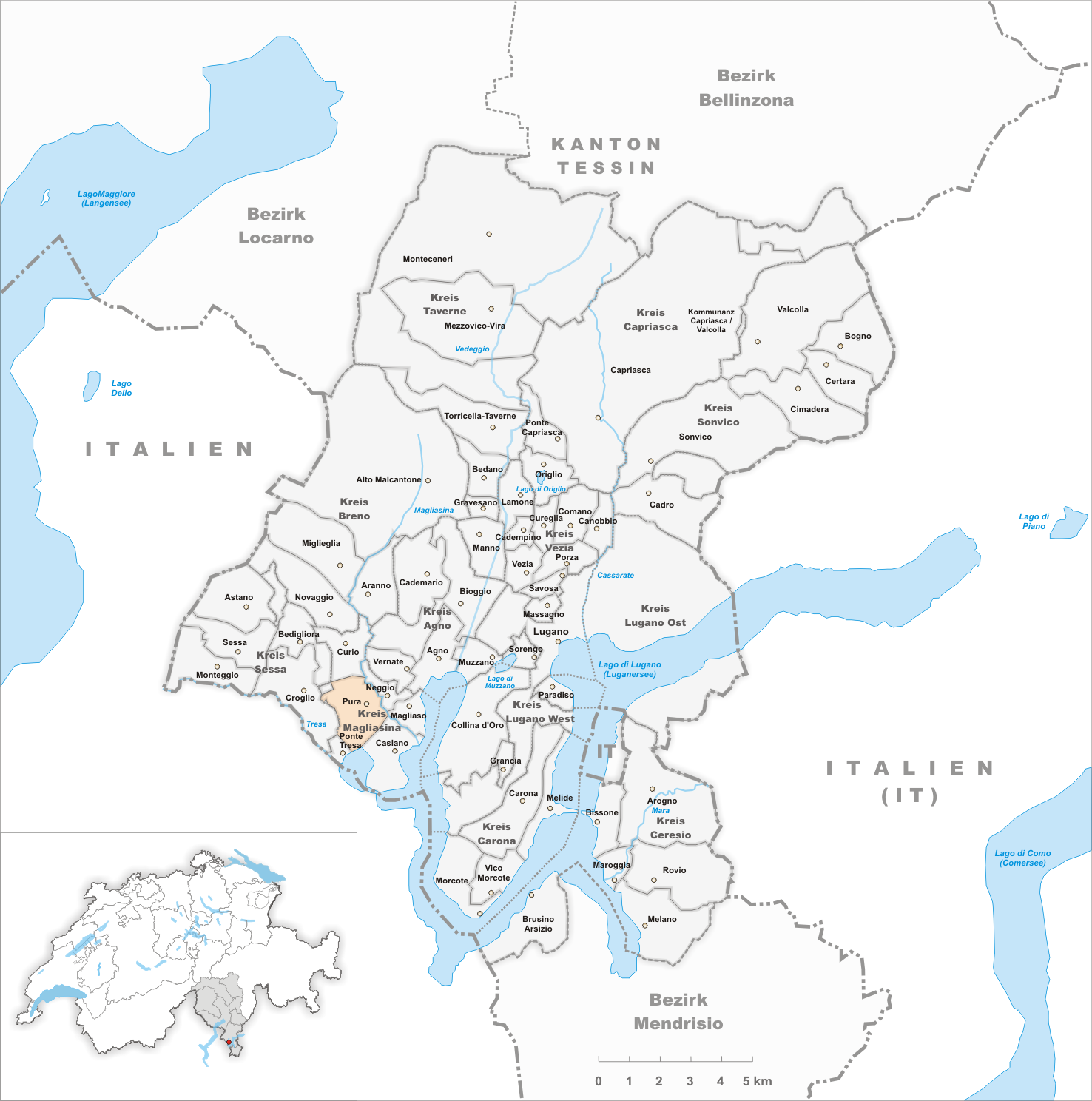 Municipality Pura